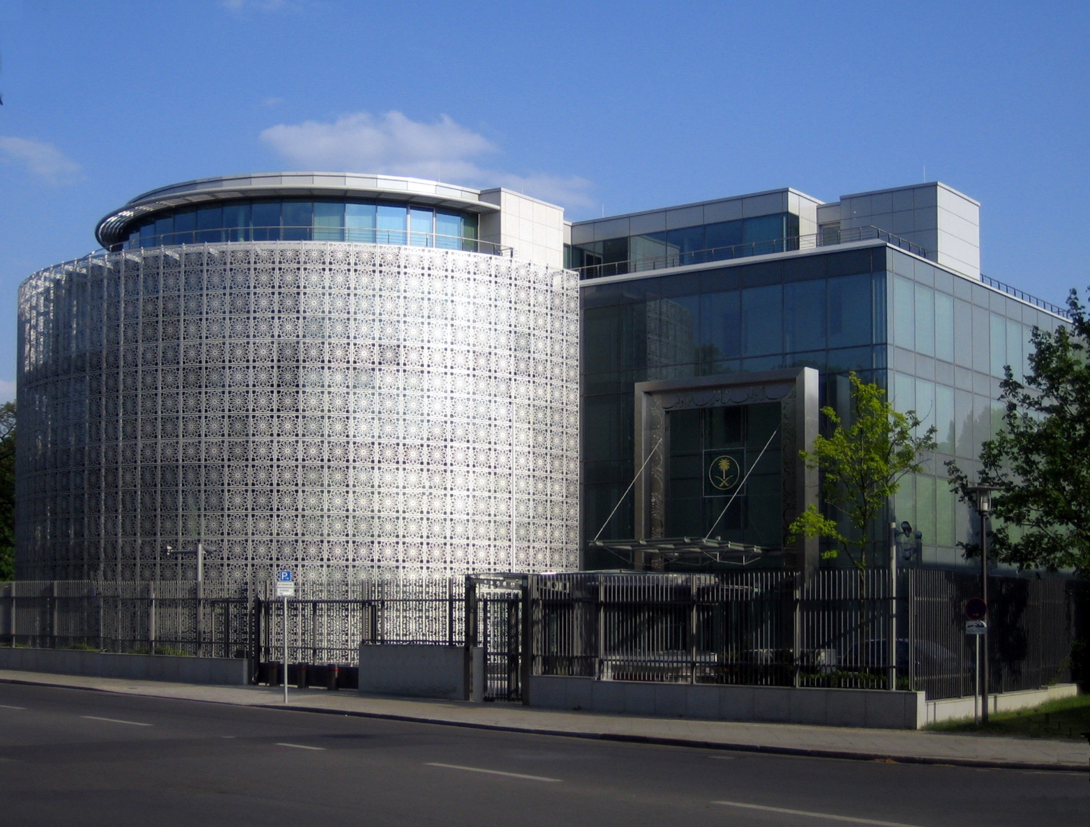 Neubau der Botschaft Saudi-Arabiens in Berlin, Tiergartenstraße 34.